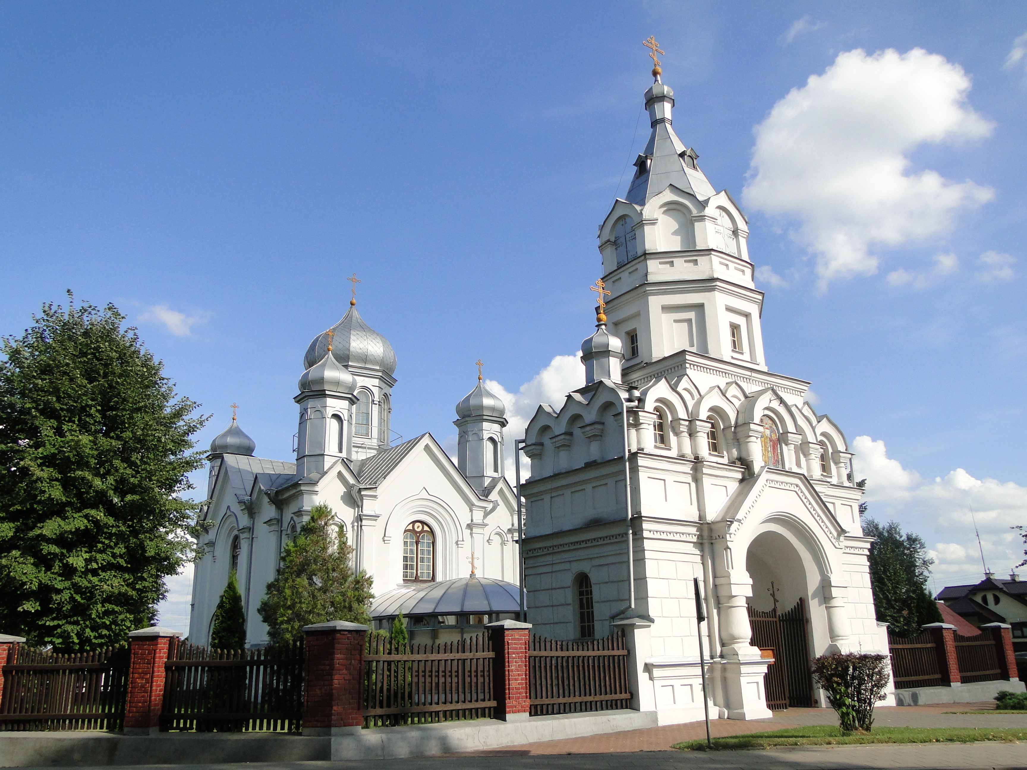 Wasilków, zespół cerkwi prawosławnej p.w. śś. Apostołów Piotra i Pawła